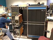 PC IBM